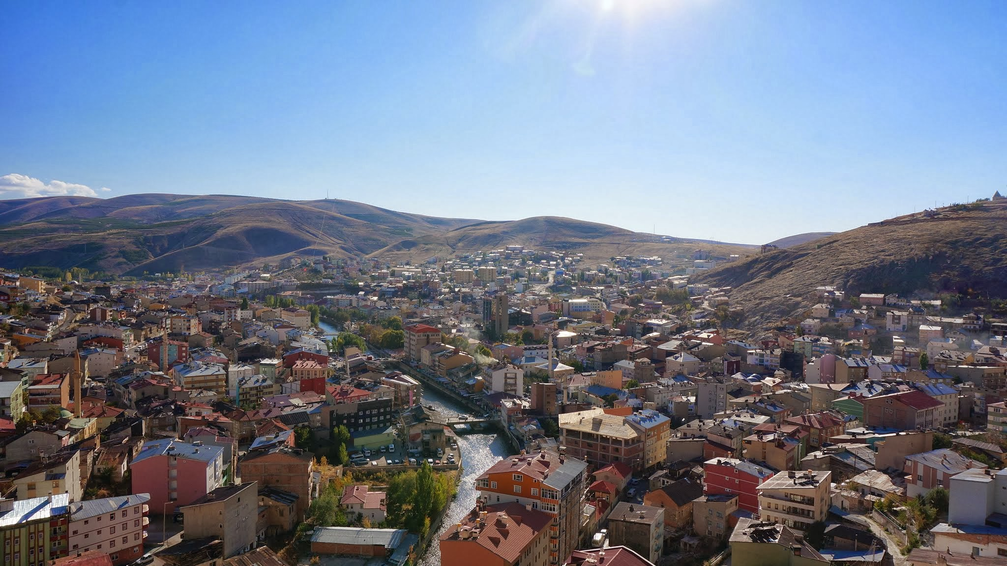 Bayburt, 69000 Bayburt Merkez/Bayburt, Turkey